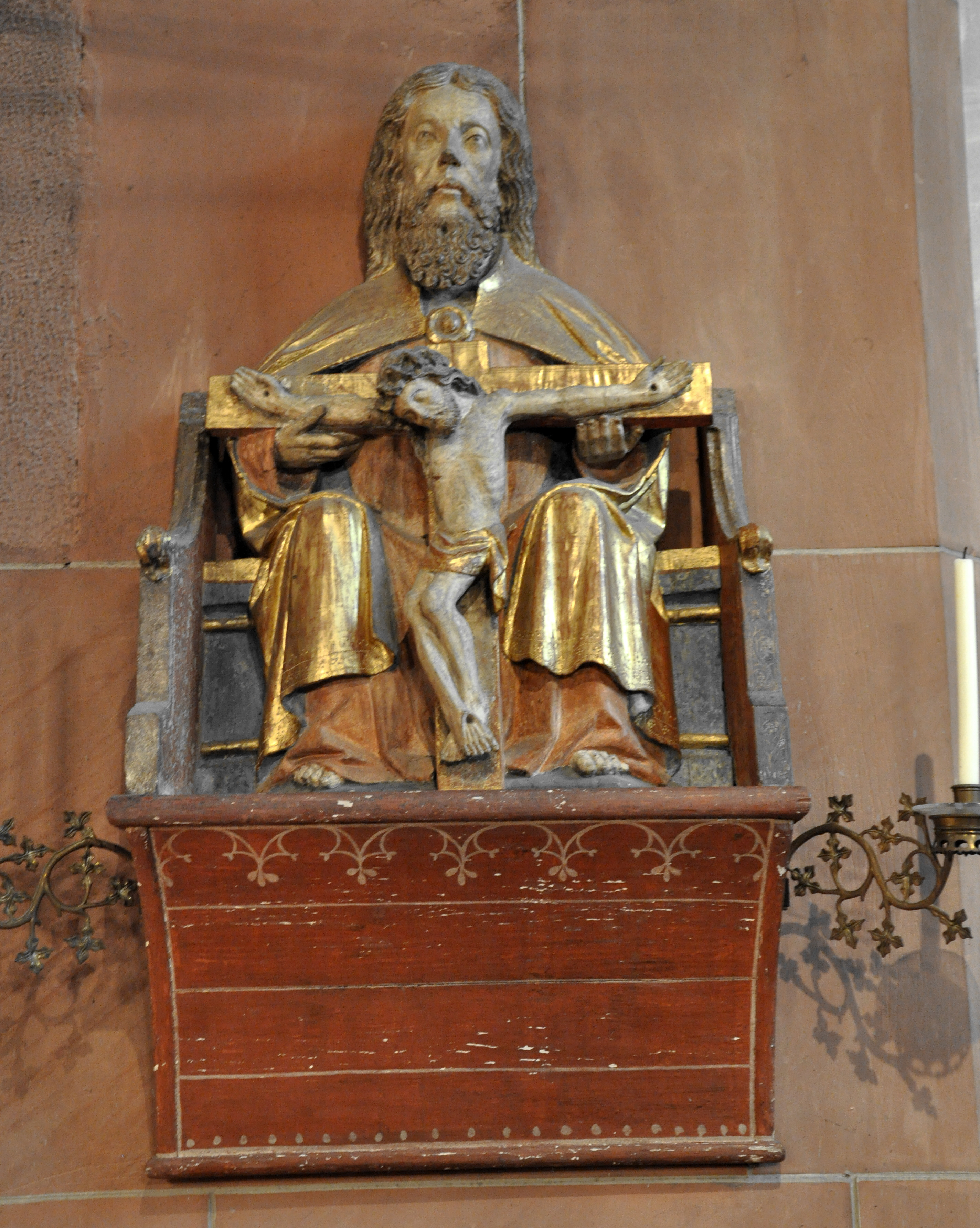 Kiedrich, Pfarrkirche St. Valentin, Gnadenstuhl, 14. Jahrhundert